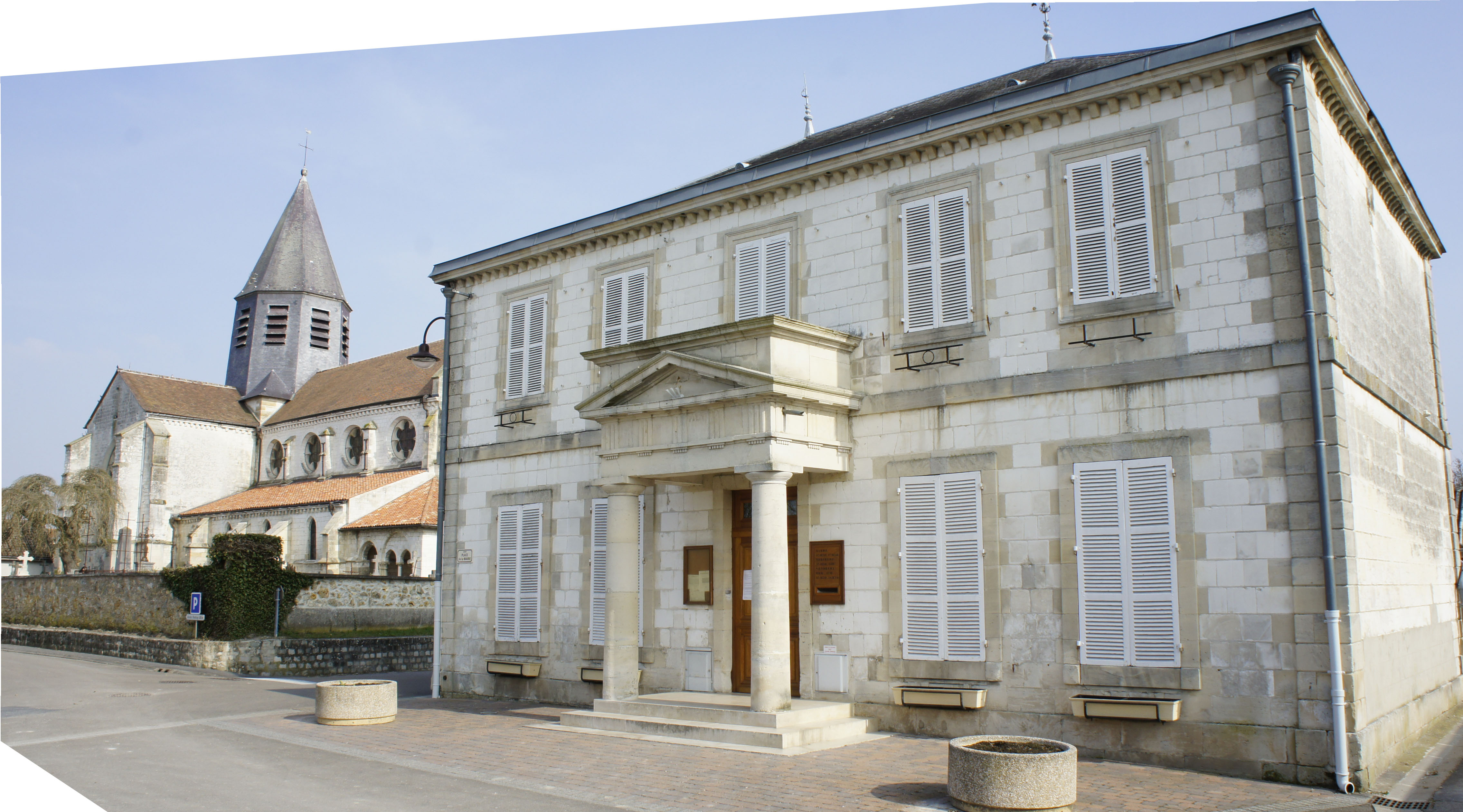 La Mairie, le cimetière et l'église de Sarry (Marne).